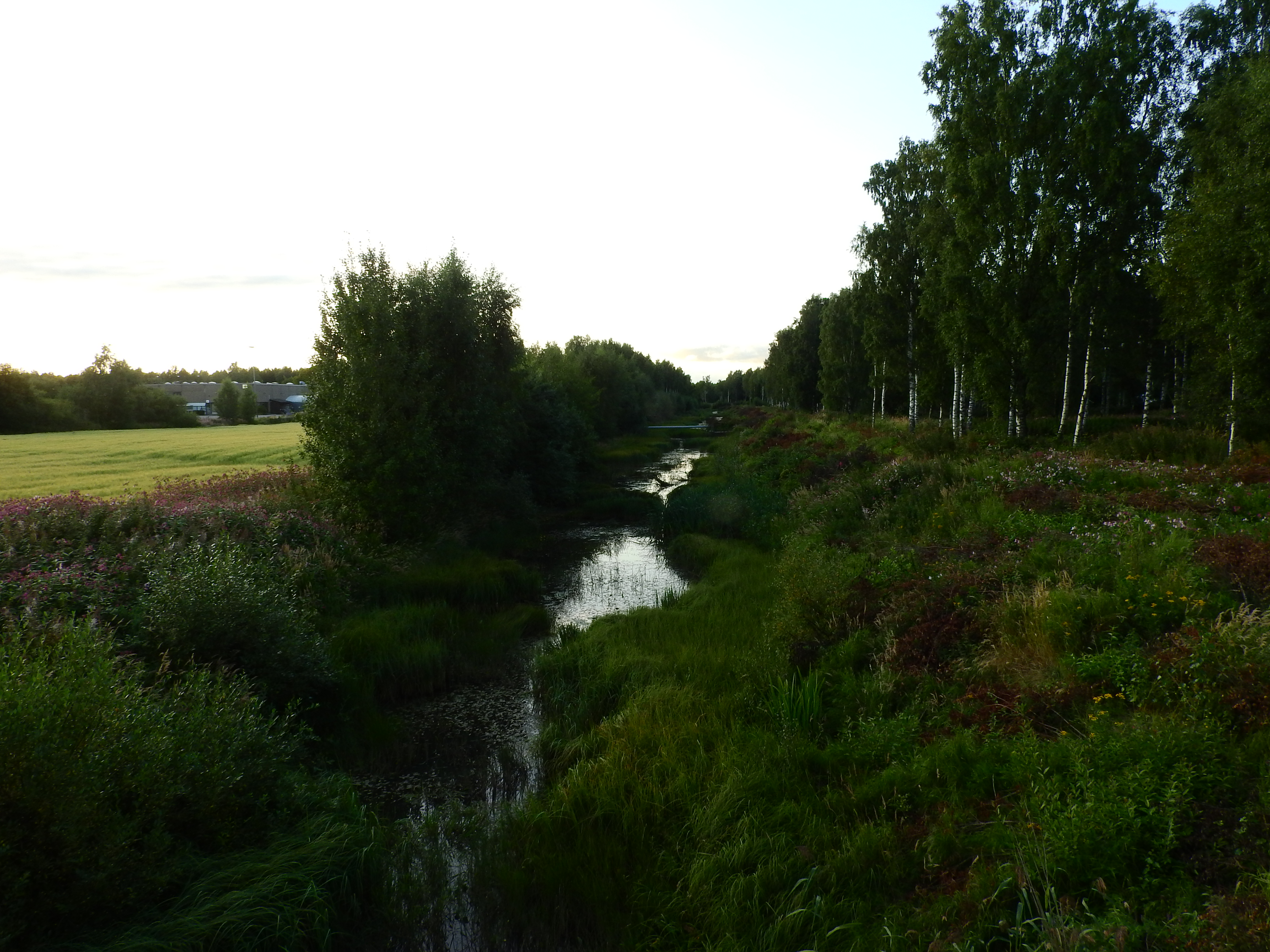 Vanhan Vaasan kanava (kanaali) Torikadulta kuvattuna 2017.